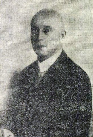 Vasadi Ottó fotóriporter